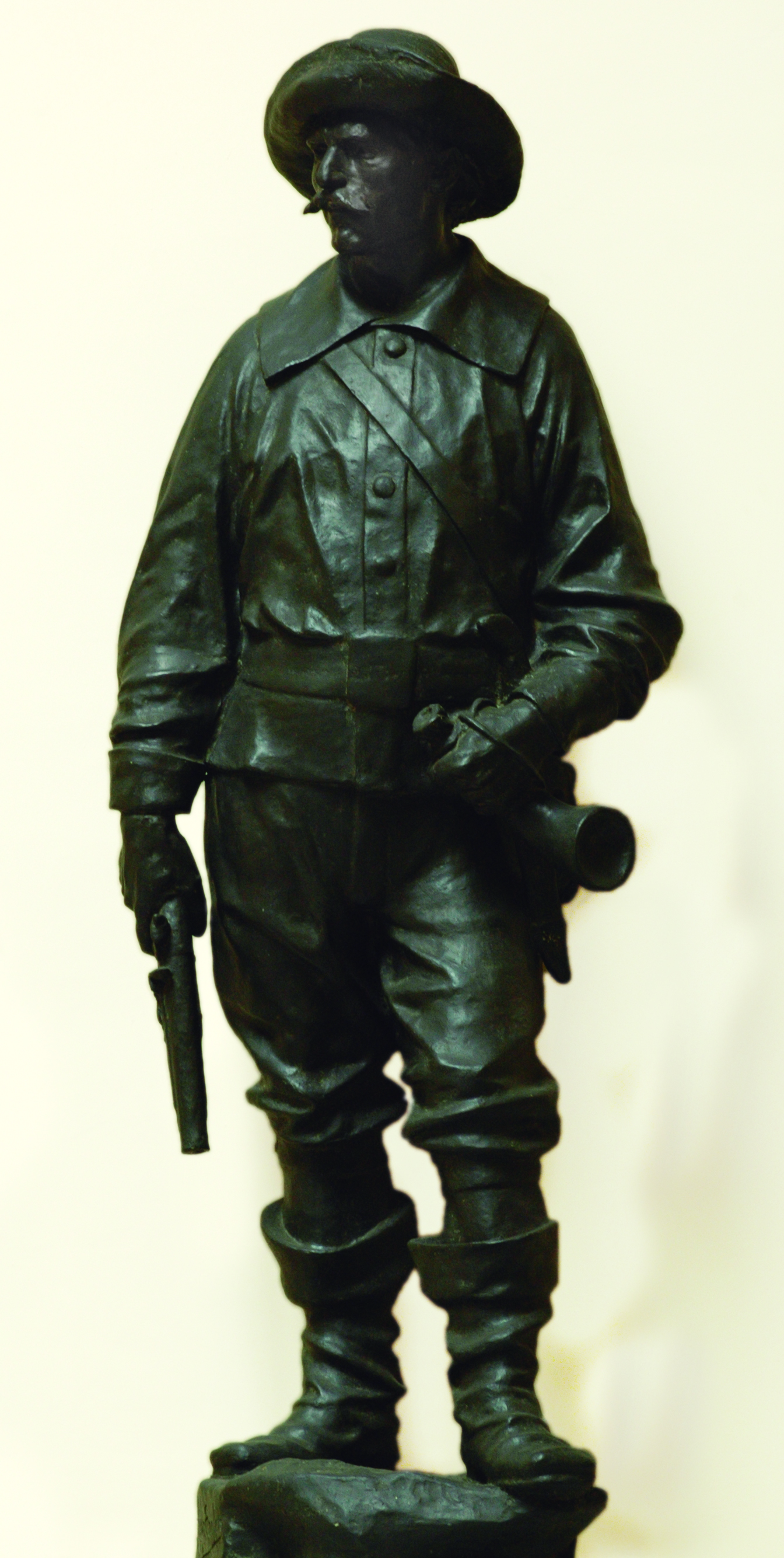 Estátua em bronze do bandeirante Francisco de Brito Peixoto, no Museu Paulista em São Paulo, 1922.